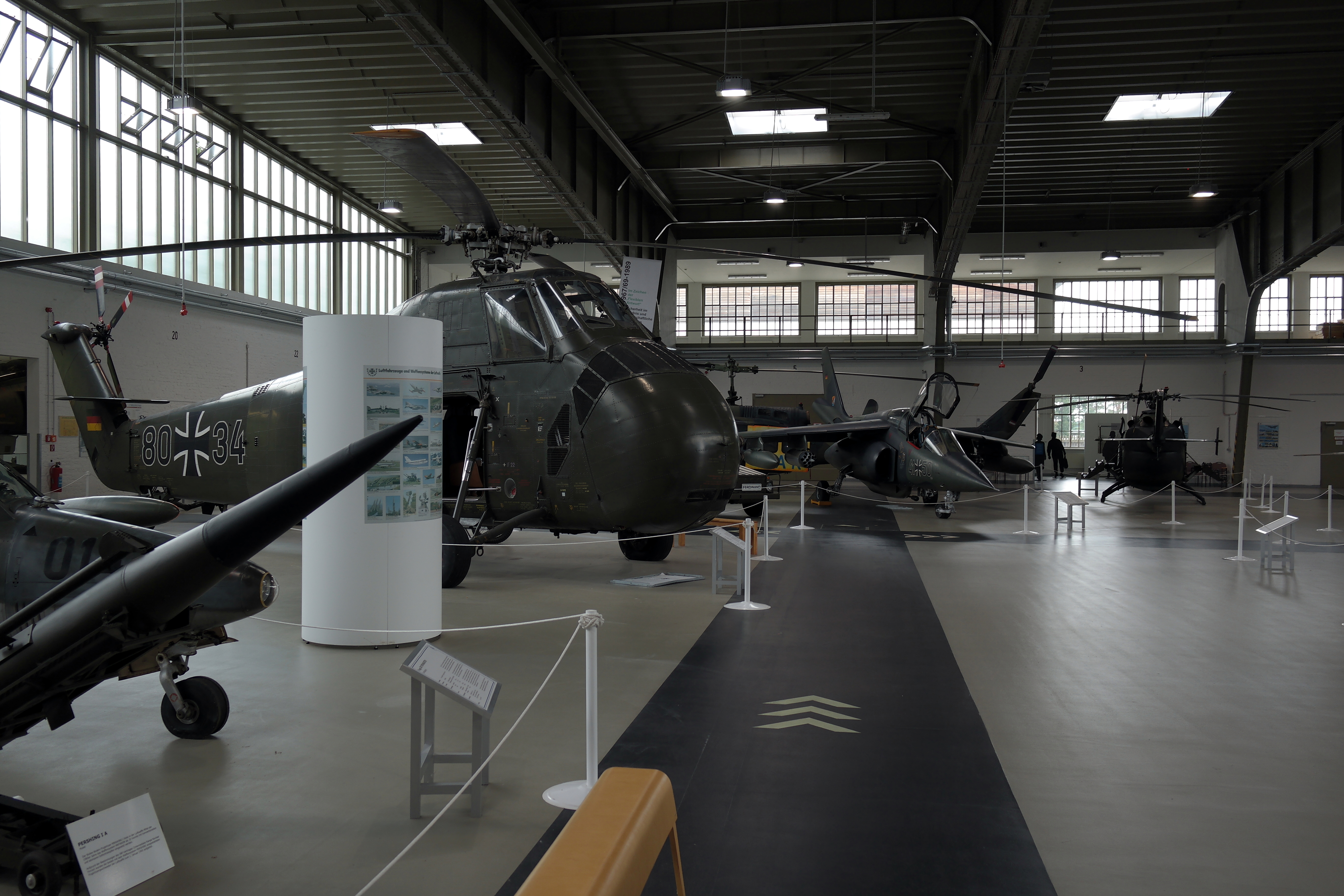 Hangar 7 - Militaerhistorisches Museum der Bundeswehr Flugplatz Berlin-Gatow